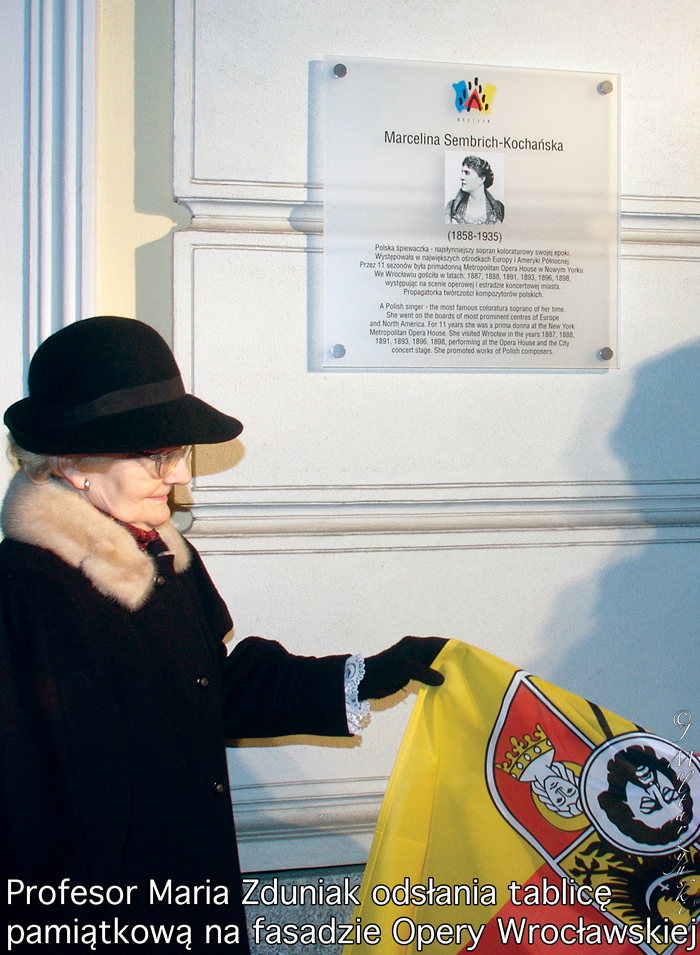 Koncert poświęcony Marcelli Sembrich,Opera Wrocławska